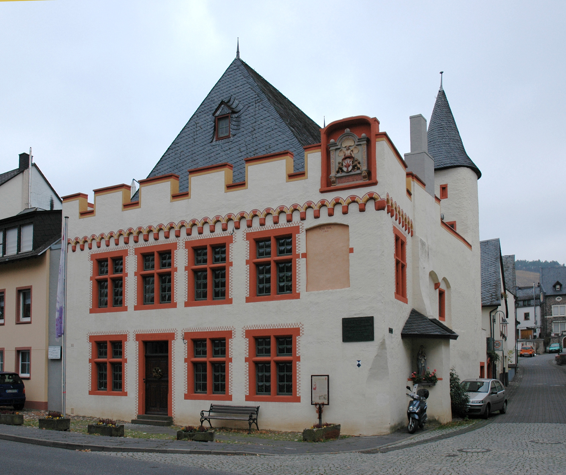 Bernkastel-Kues, Nikolausufer 49/50: Geburtshaus des Nikolaus von Kues This is a photograph of an architectural monument.It is on the list of cultural monuments of Bernkastel-Kues